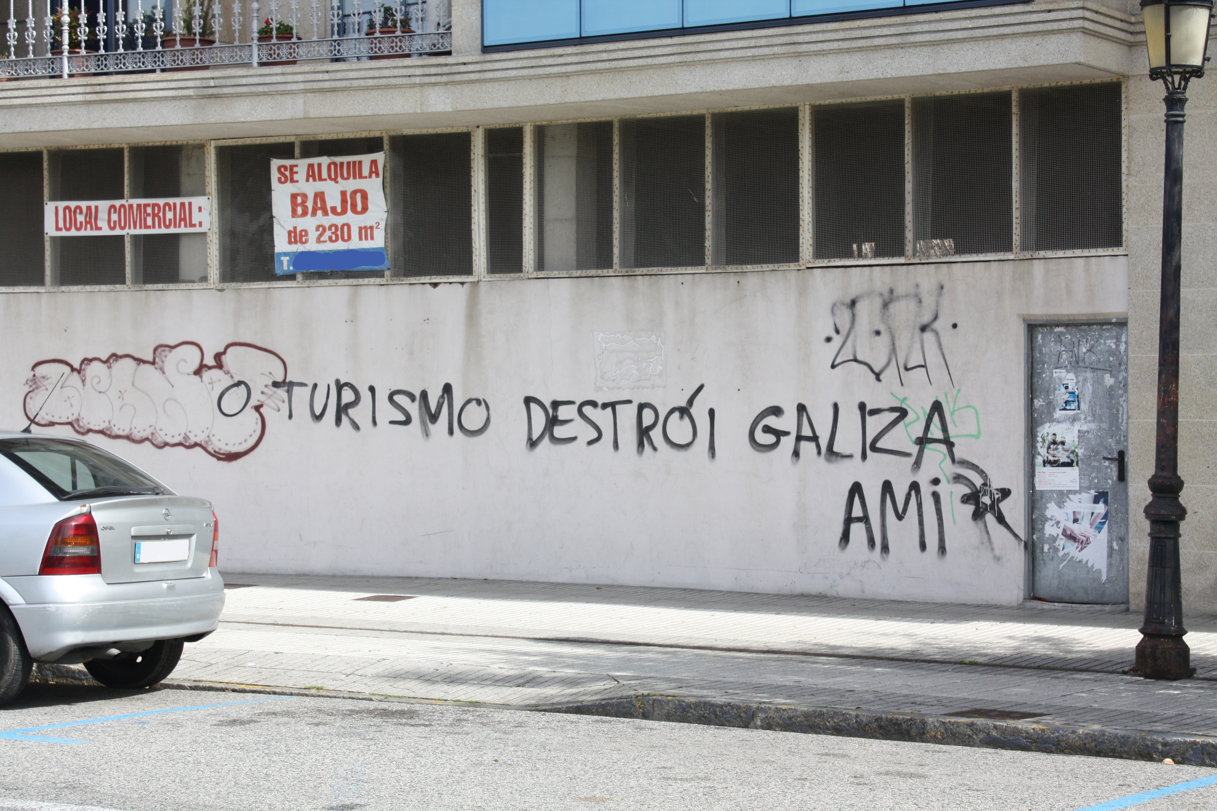 Pintada en Vilagarcía de Arousa (Pontevedra)